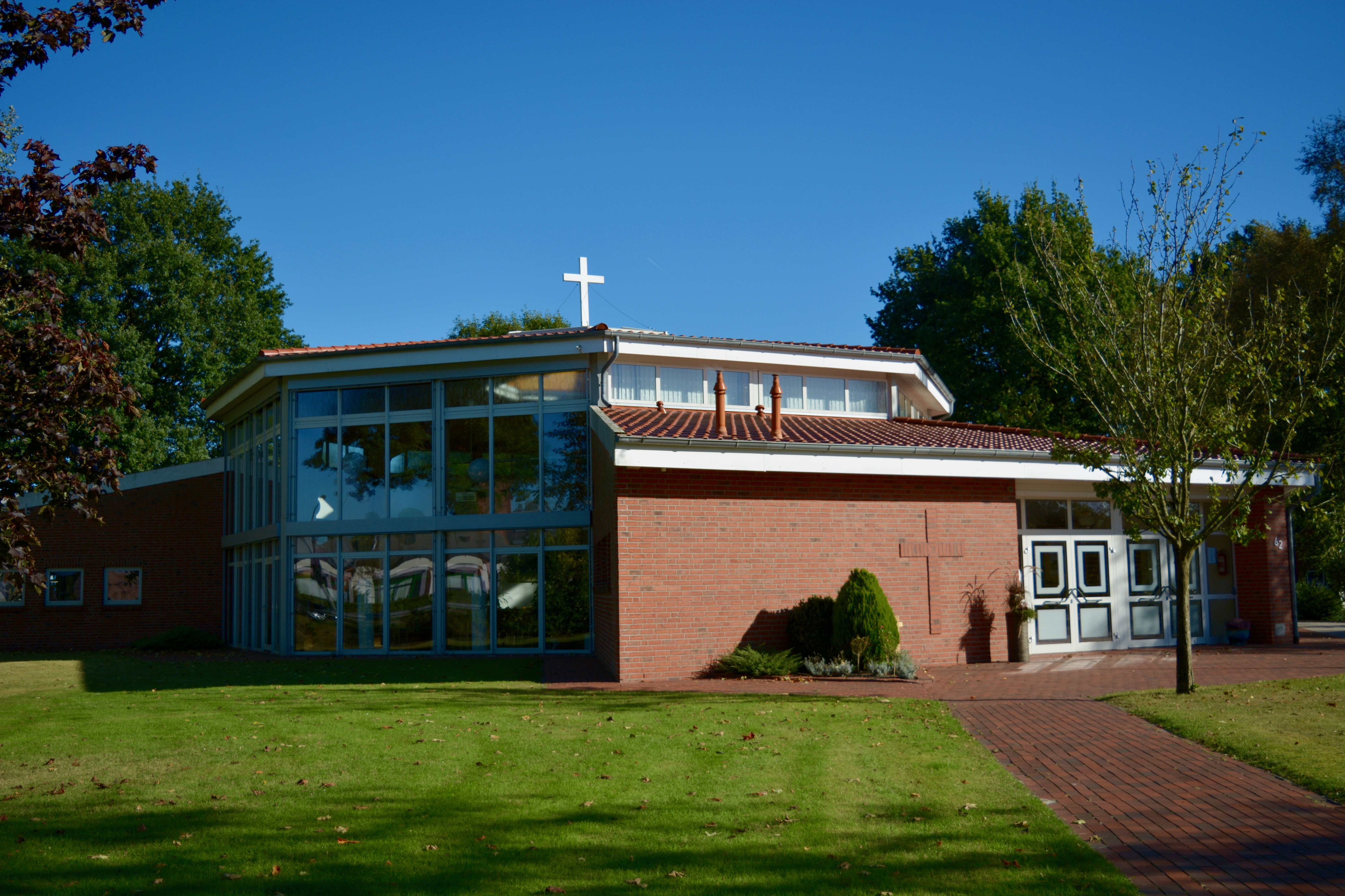 Das 1998 eingeweihte Gemeindezentrum der EFG Augustfehn (Baptisten) im Osterkamp 62 in Augustfehn.